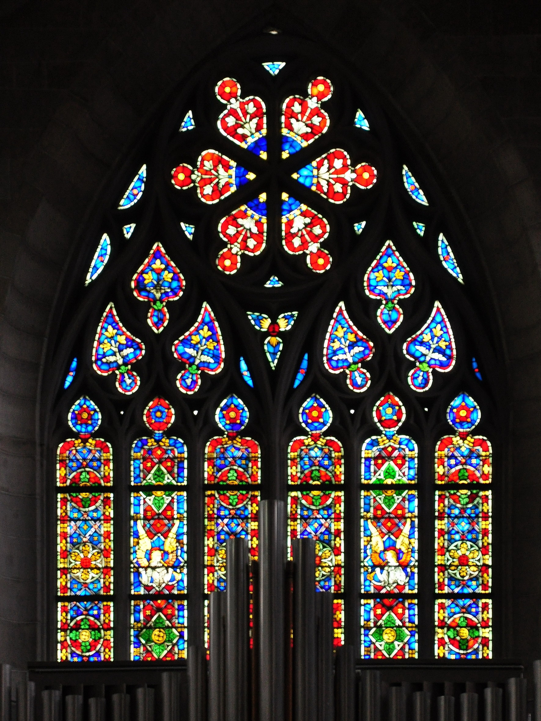 Westfenster, sogenanntes Heaton-Fenster im Fraumünster in Zürich. Clement Heaton liess sich um 1887 im Val de Travers nieder, um sich künstlerisch zu betätigen. 1893 zog er mit seiner Familie nach Neuchâtel. Seine Tätigkeit als Glaser musste er vorübergehend aufgeben; ab 1901 wandte er sich wieder der Glasmalerei zu.